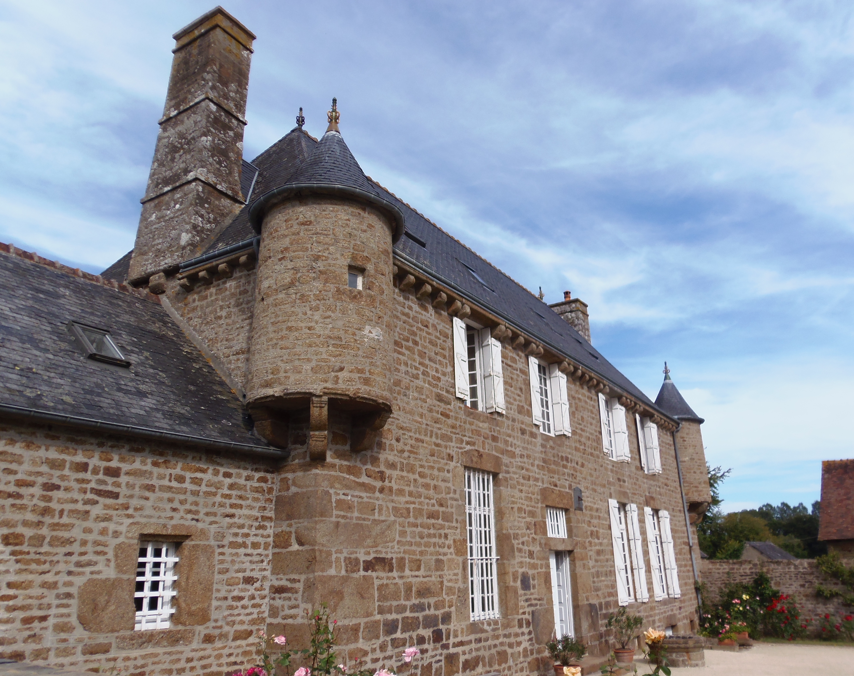 Passais (Normandie, France). Le manoir de la Guérinière.